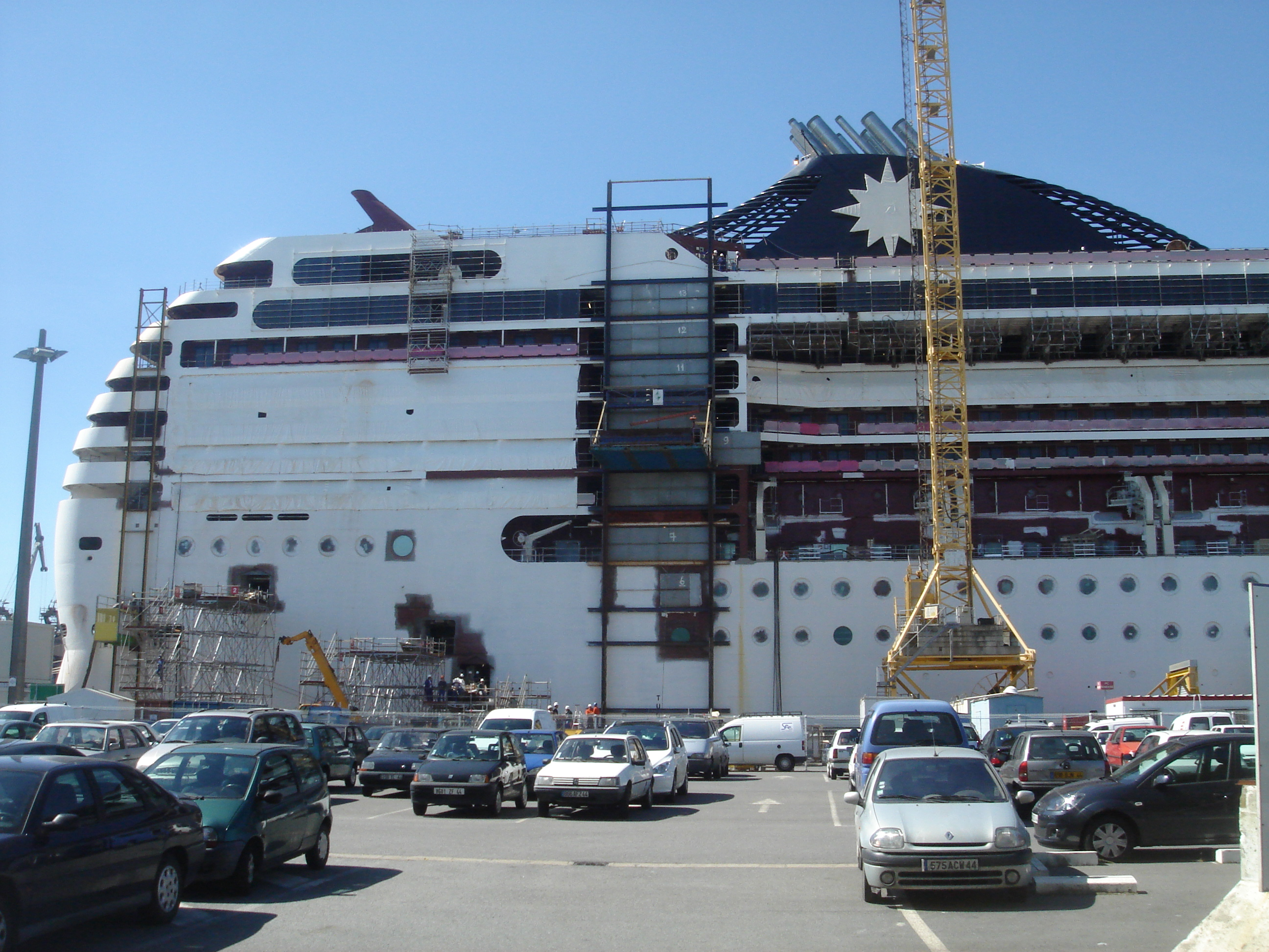 Chantier naval de Saint-Nazaire, Loire Atlantique, France